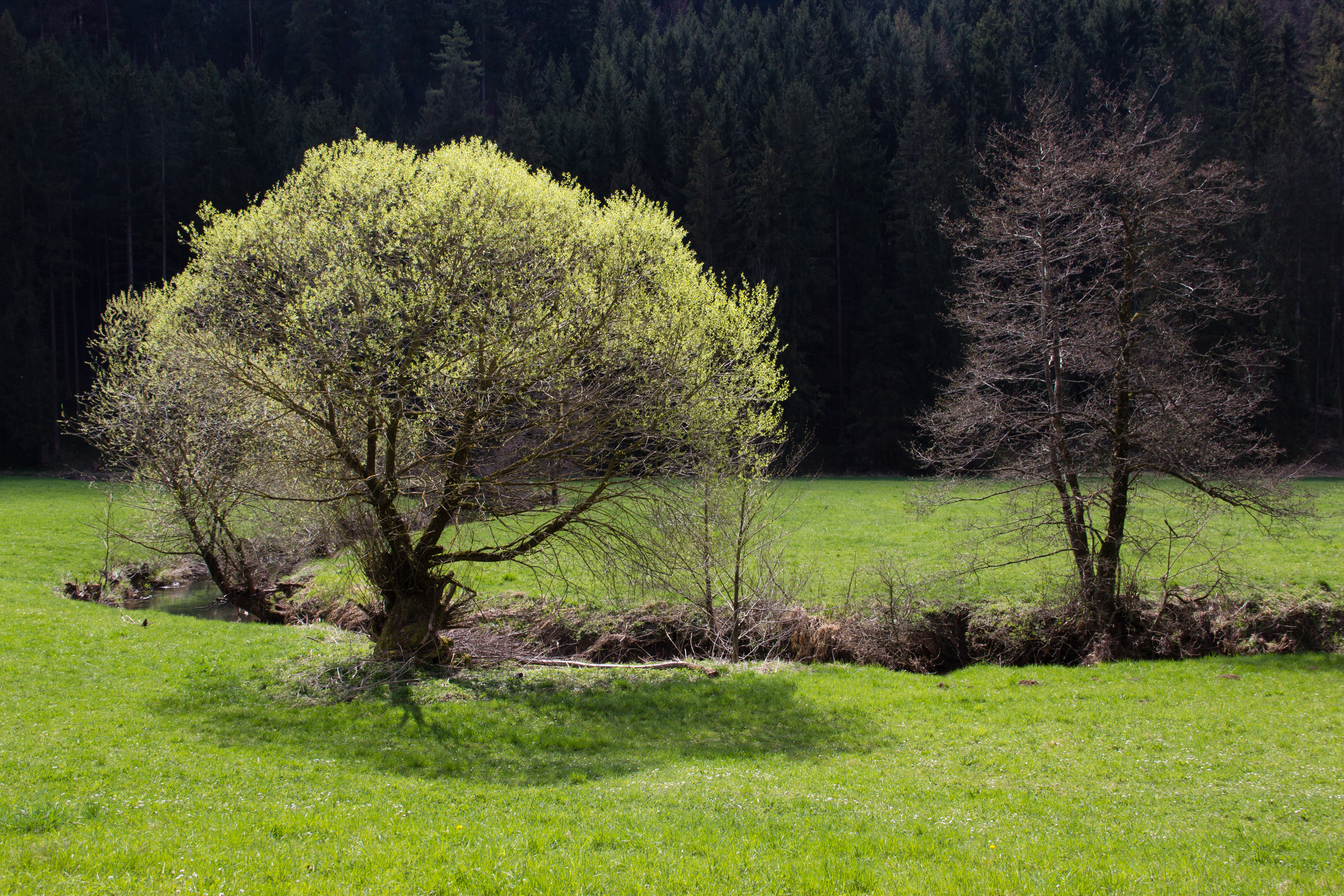 Weiße Laber, Dietfurt, Naturpark Altmühltal